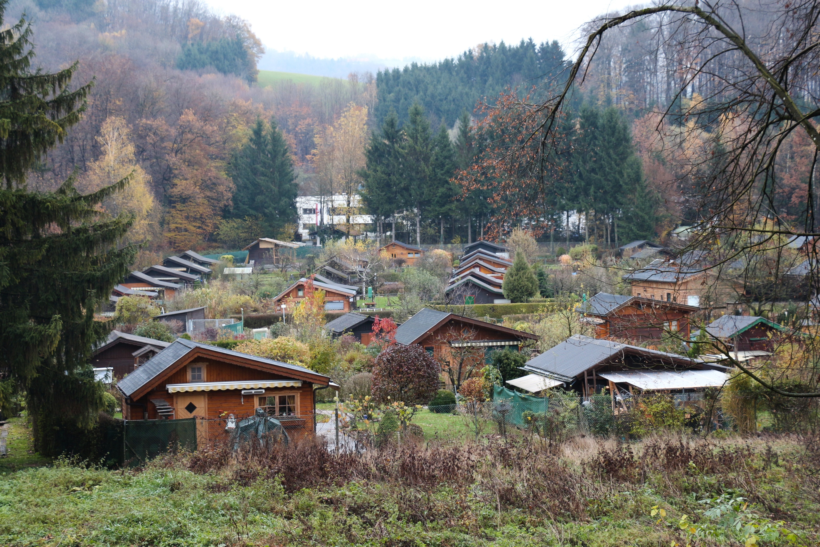 Kleingartensiedlung Salzburg-Kasern im November